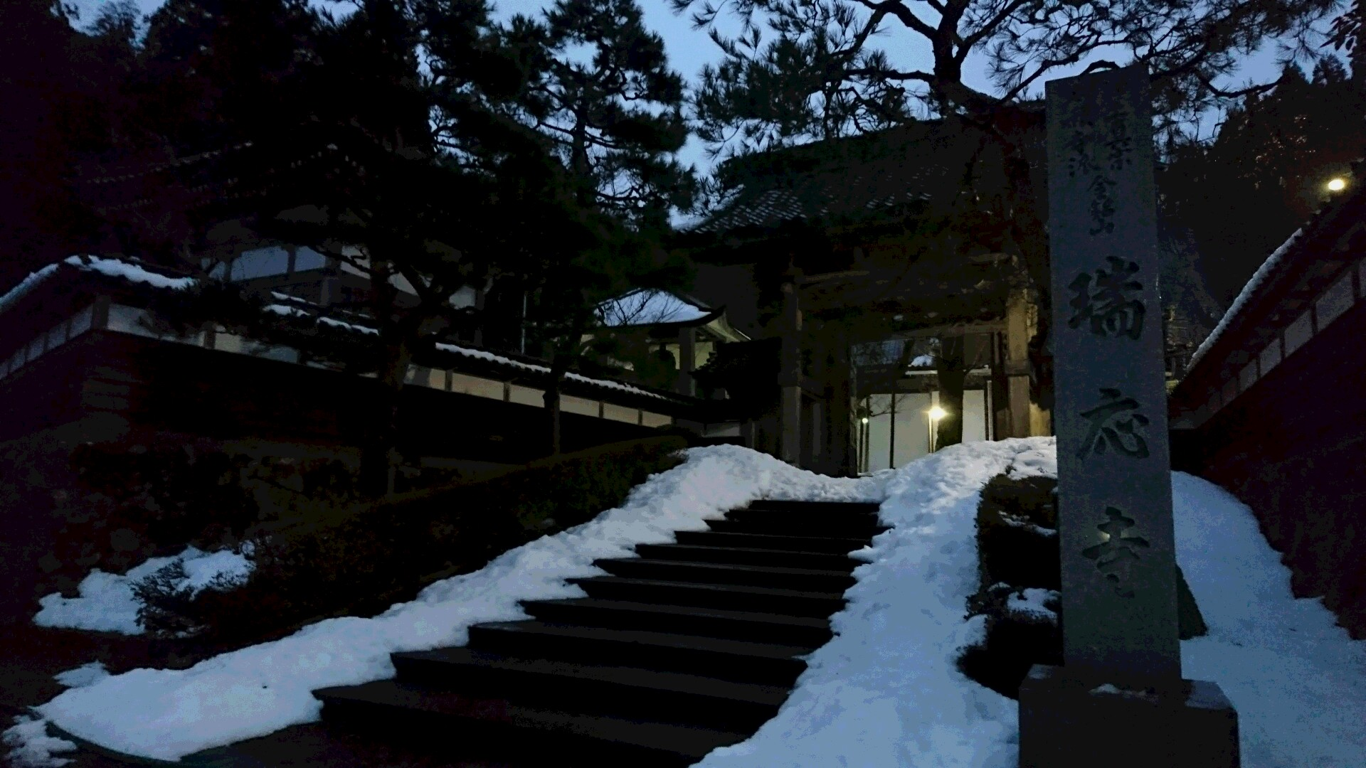 瑞應寺の写真（門）